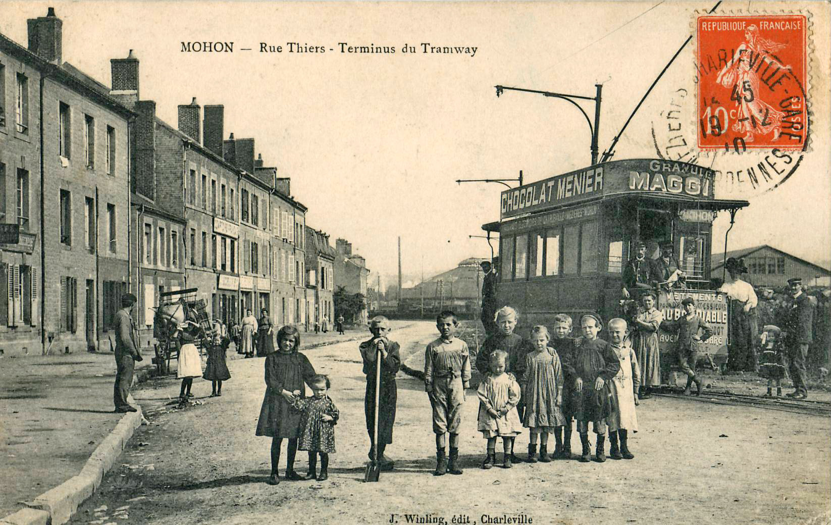 Carte postale éditée par J. Winling à Charleville :MOHON - Rue Thiers - Terminus du Tramway aux abords de la gare.On distingue à l'arrière-plan la rotonde du dépôt de Mohon